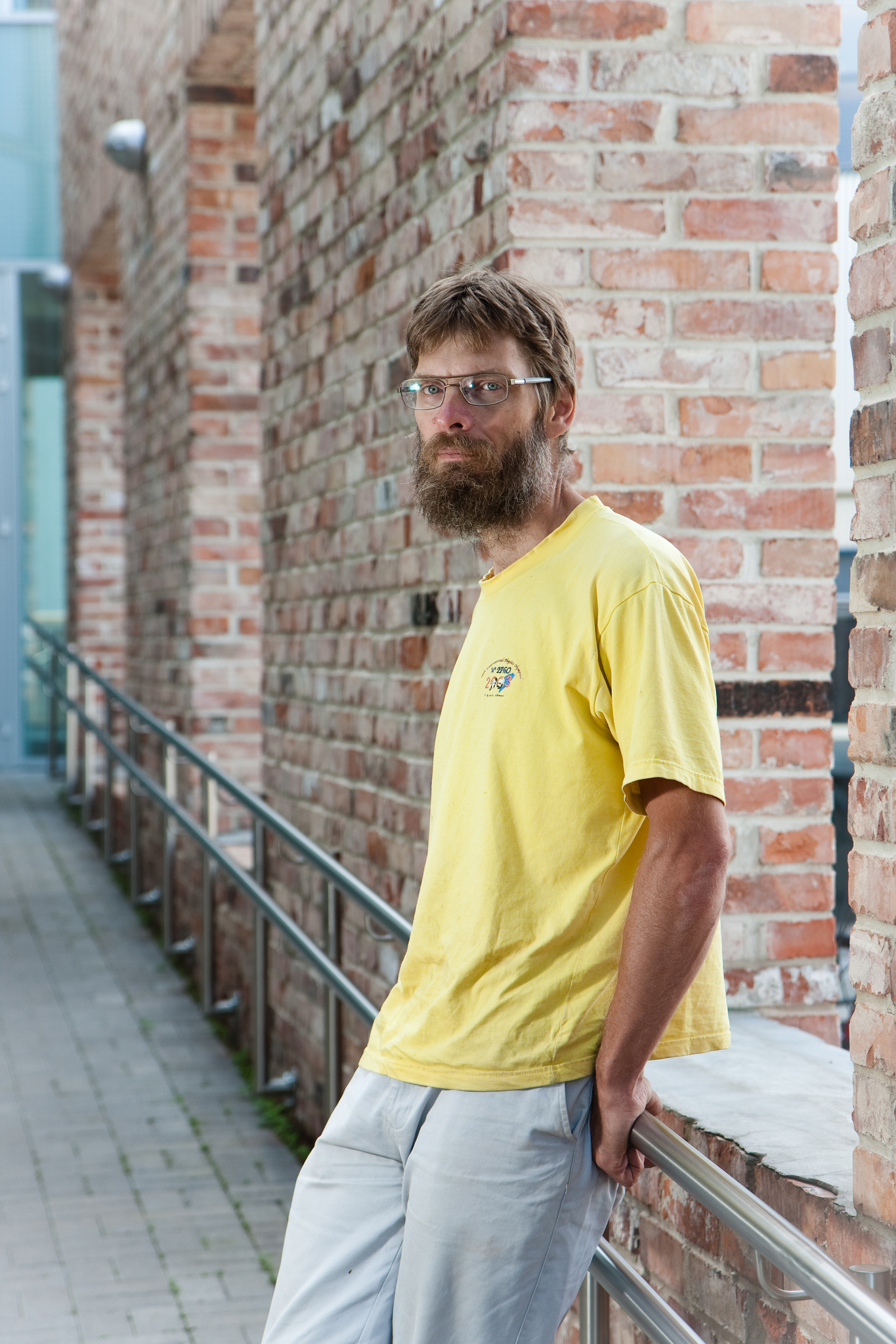 Eesti füüsik Jaan Kalda Tartus AHHAA keskuse ees.